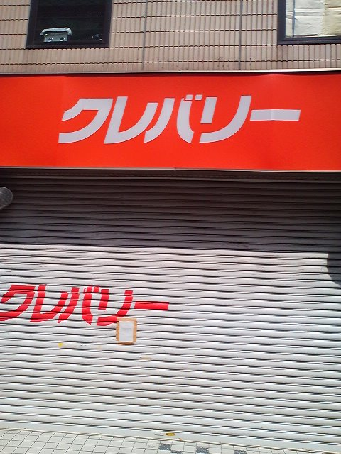 クレバリーインターネット館 平成２４年６月８日